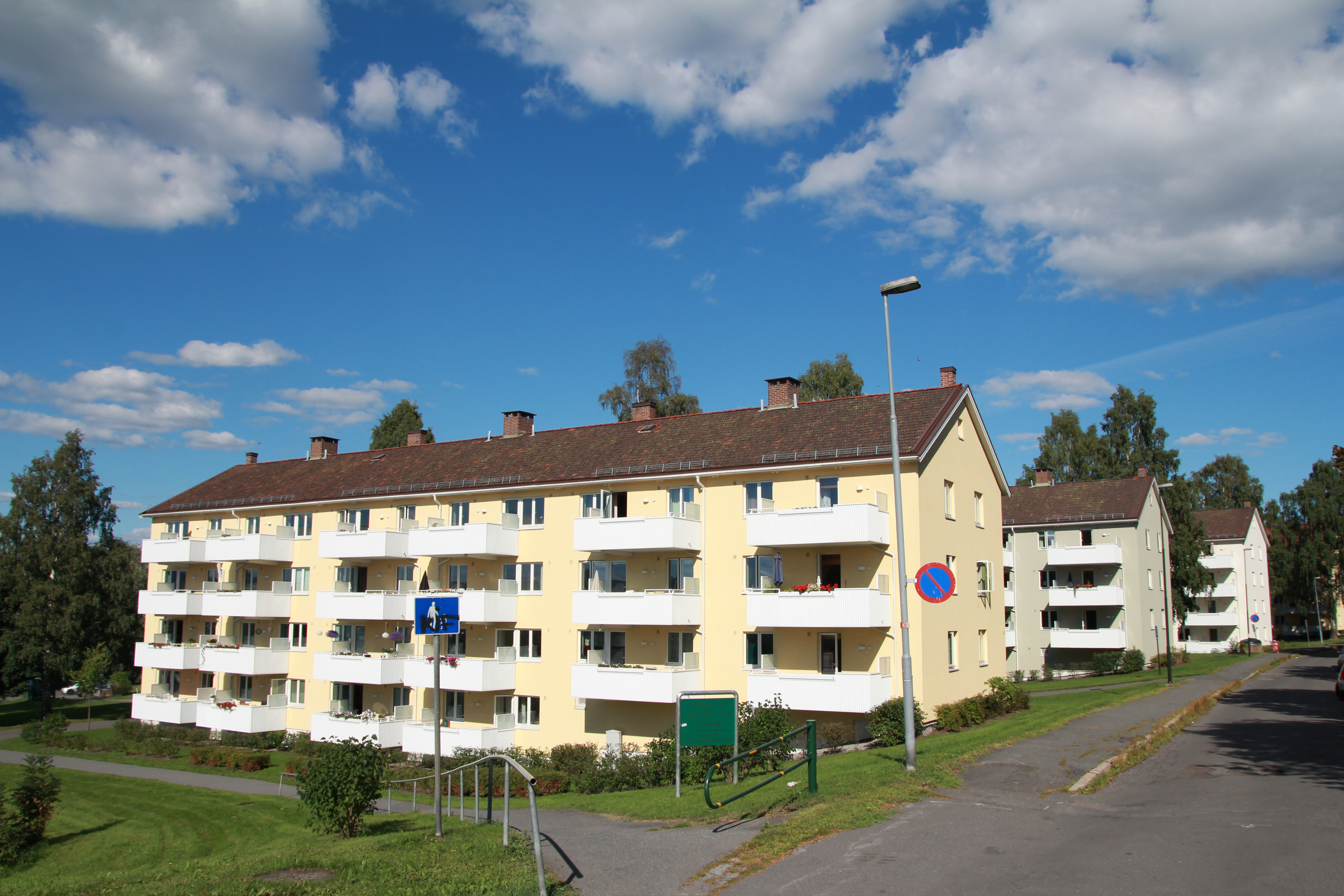 Keyserløkka er et boligstrøk og grøntområde i bydel Grünerløkka i Oslo.